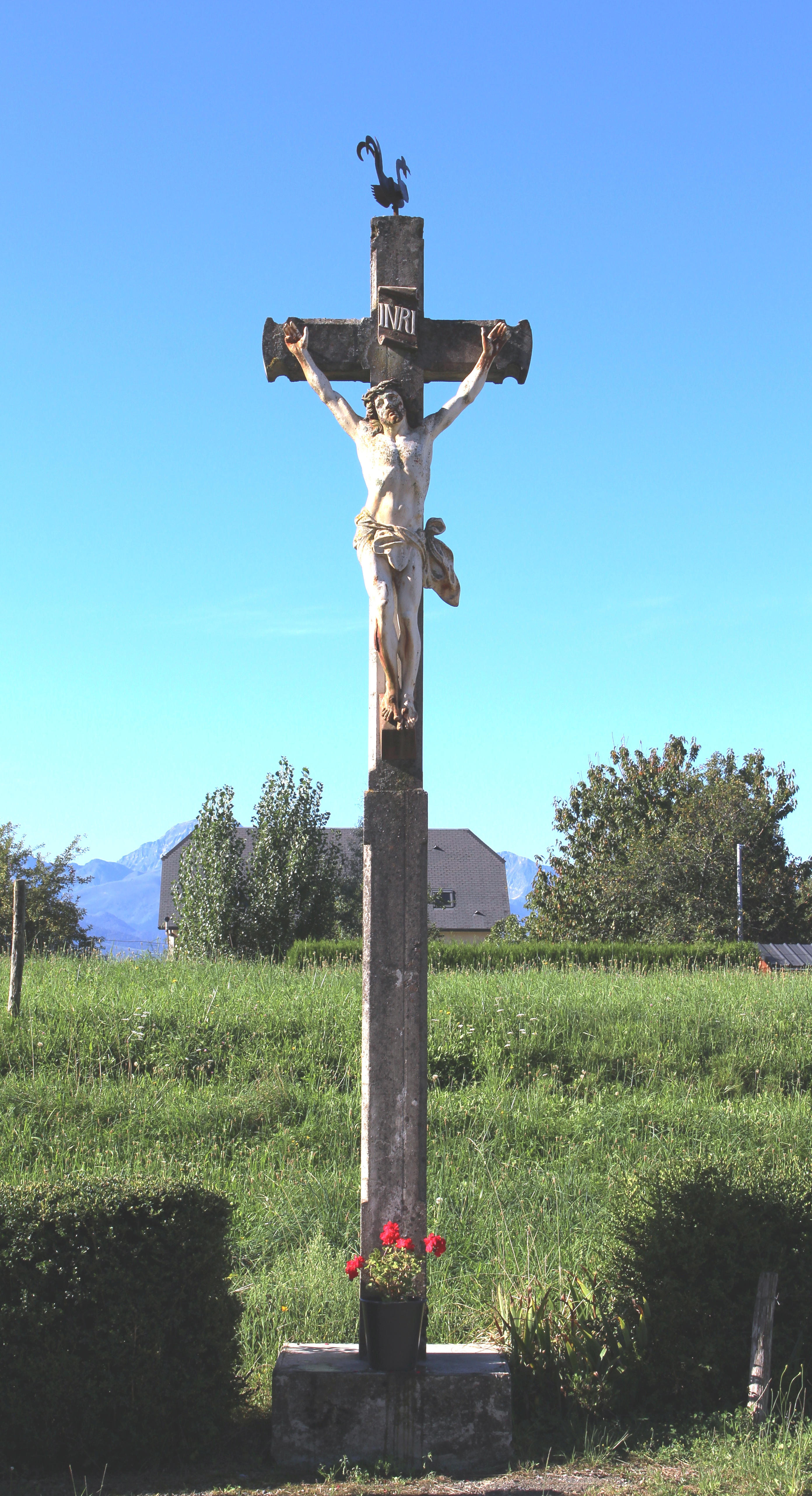 Croix de Chelle-Spou (Hautes-Pyrénées)